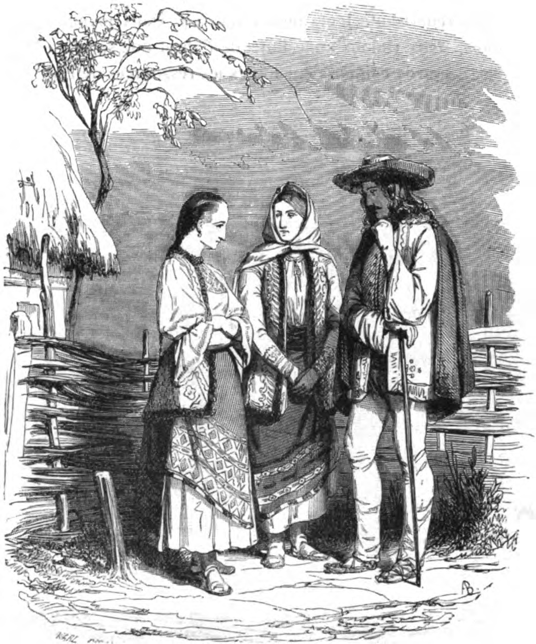 Costumes Valaques